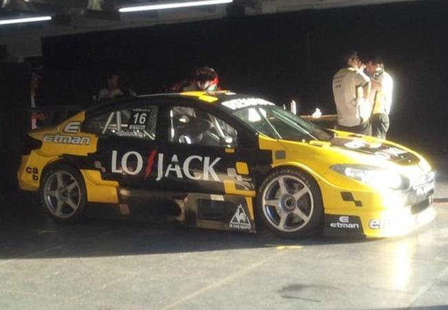 Renault Fluence 2011 de TC 2000